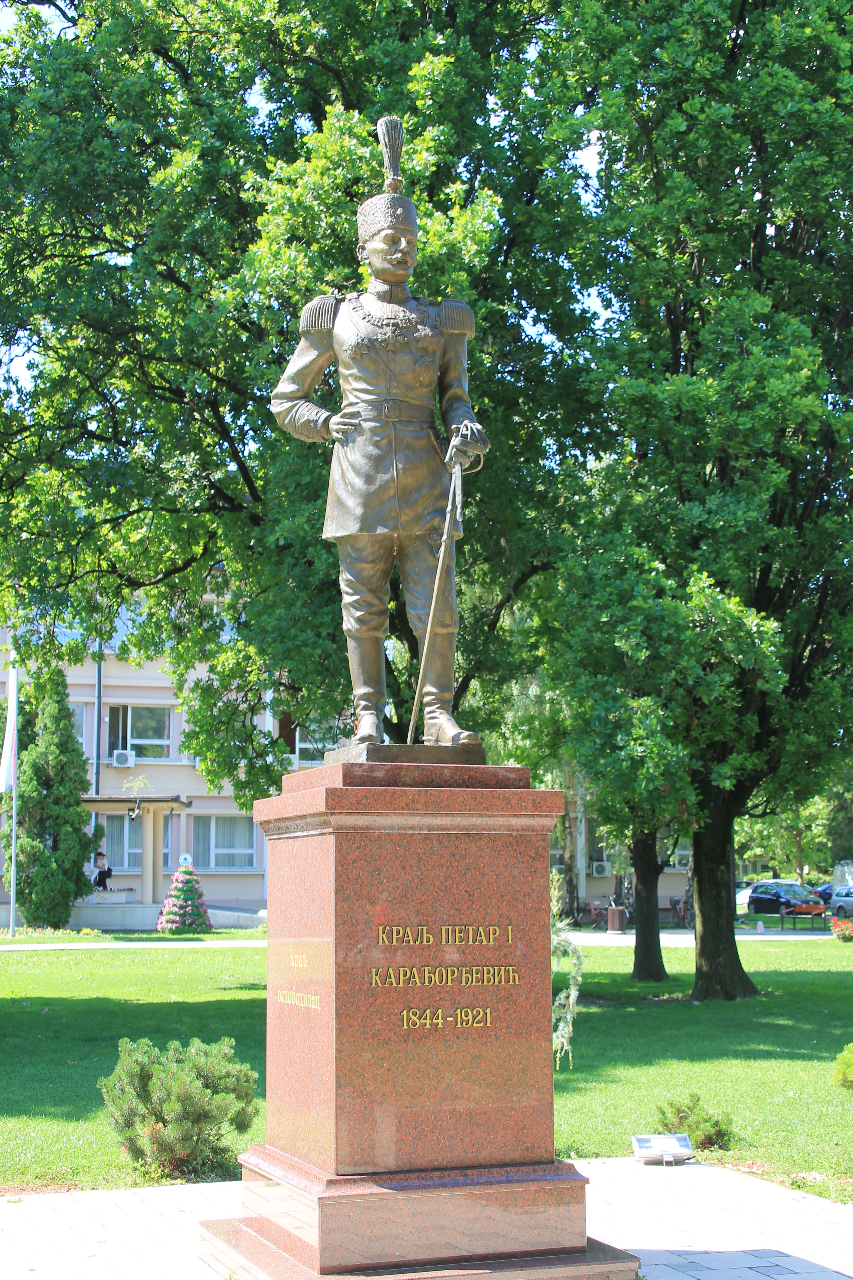 Spomenik kralja Petra I Karađorđevića